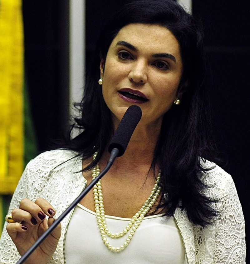 Simone Morgado em novembro de 2015.